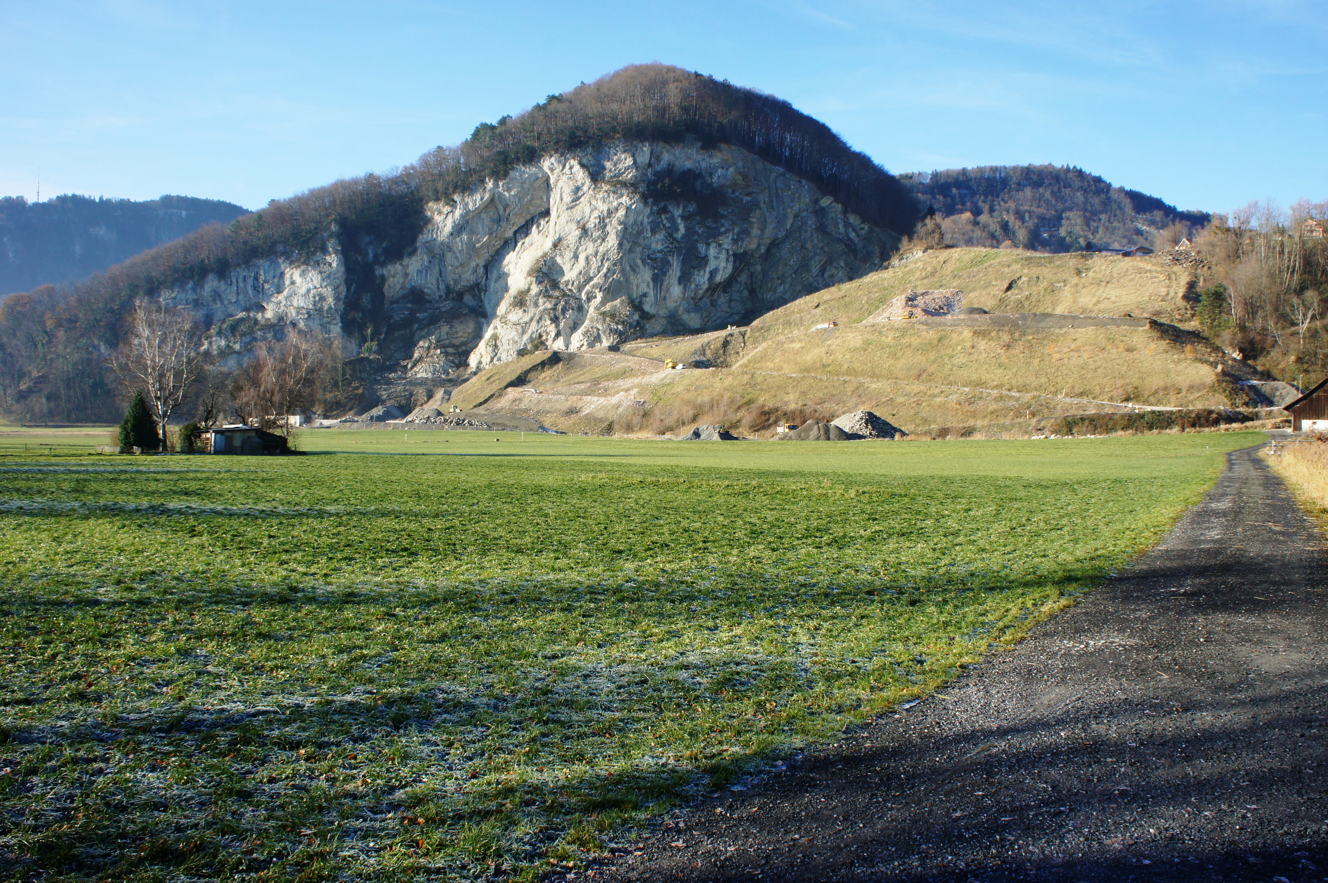 Überblick auf die Deponie Unterkobel in Oberriet.